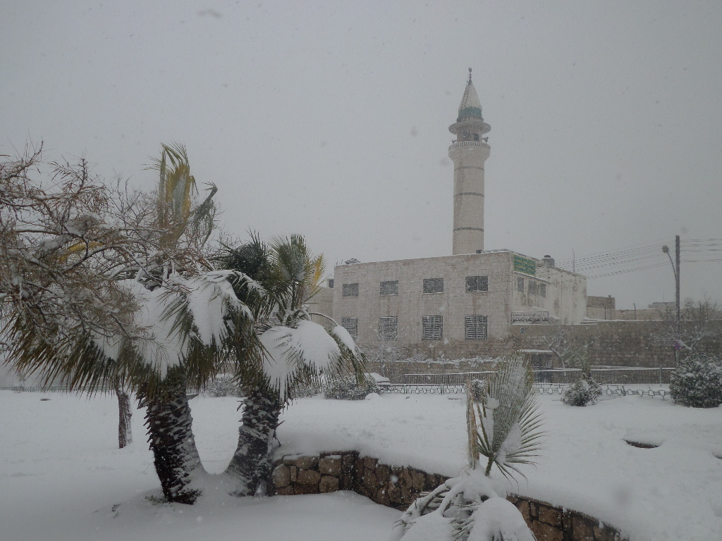 المسجد أثناء الثلج